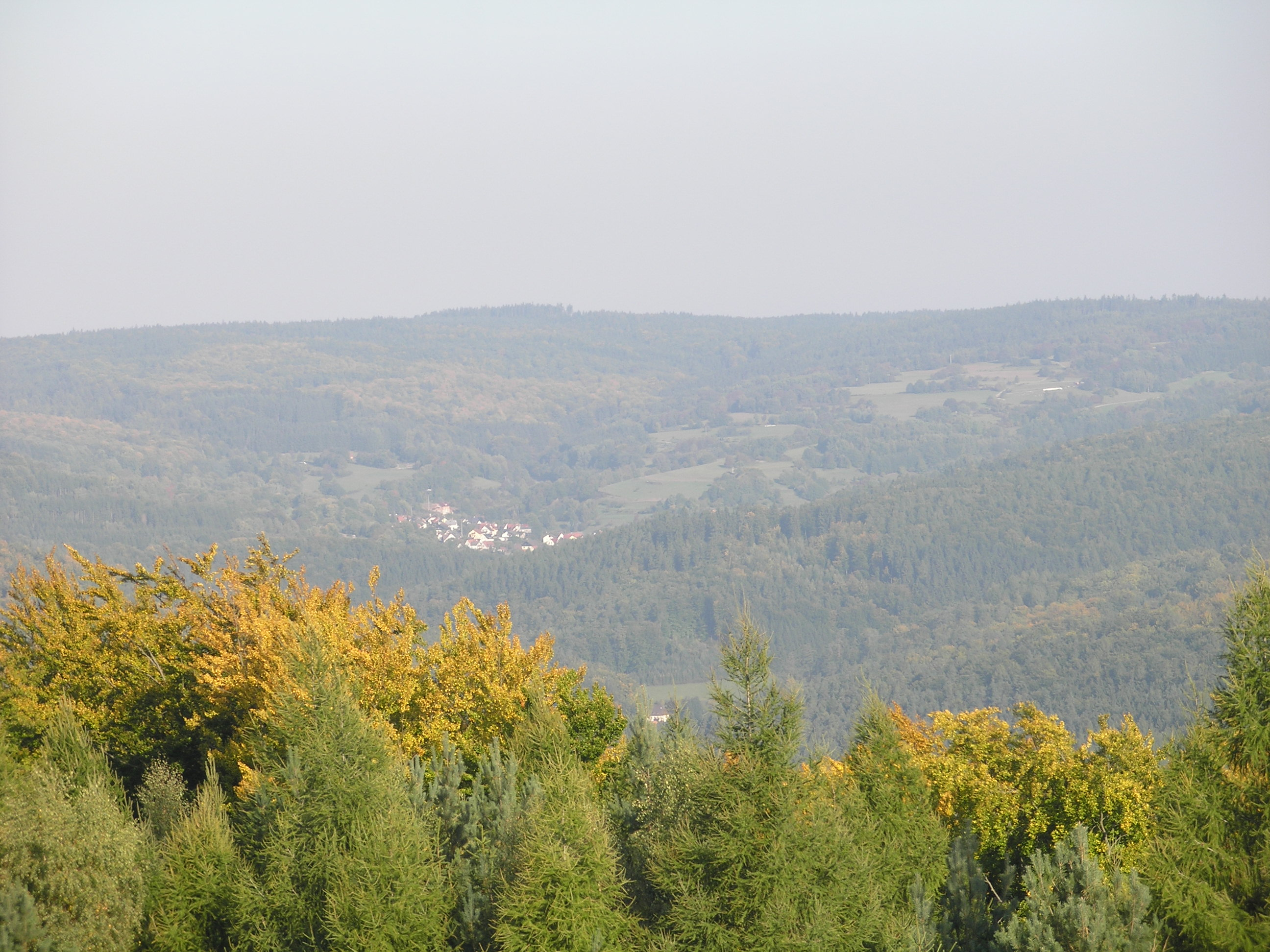 Auf dem Höhenweg von der Solhöhe zur "Bayerischen Schanz", Blick von der Staumauer des Pumpspeichersees nach Norden (Ruppertshütten)